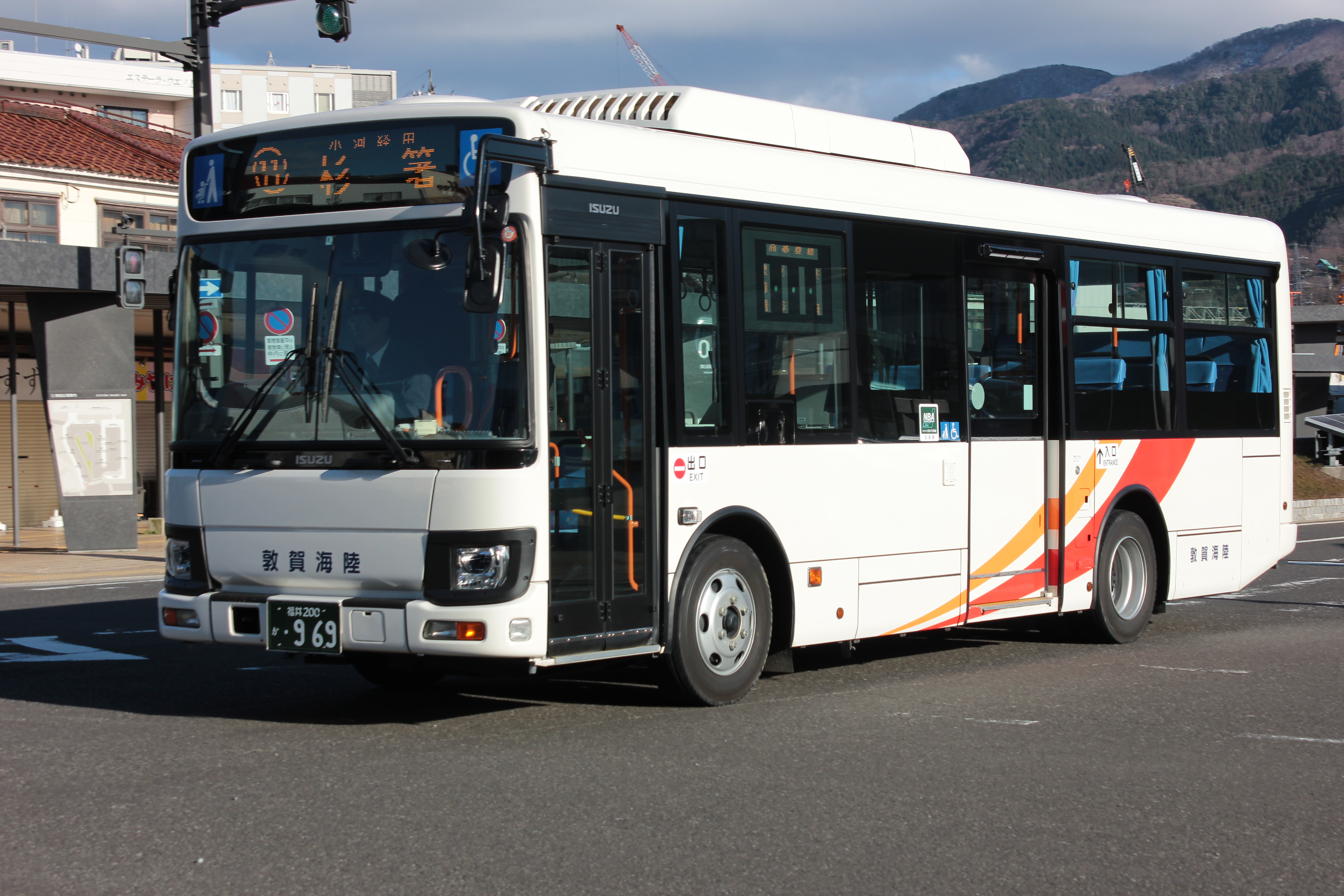 敦賀海陸運輸のいすゞ・エルガ（敦賀駅前にて） Canon EOS Kiss X5